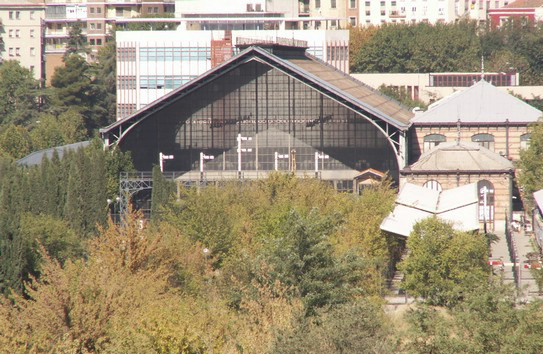 Vista de la antigua Estación de Delicias desde el acceso elevado al Parque Enrique Tierno Galván.